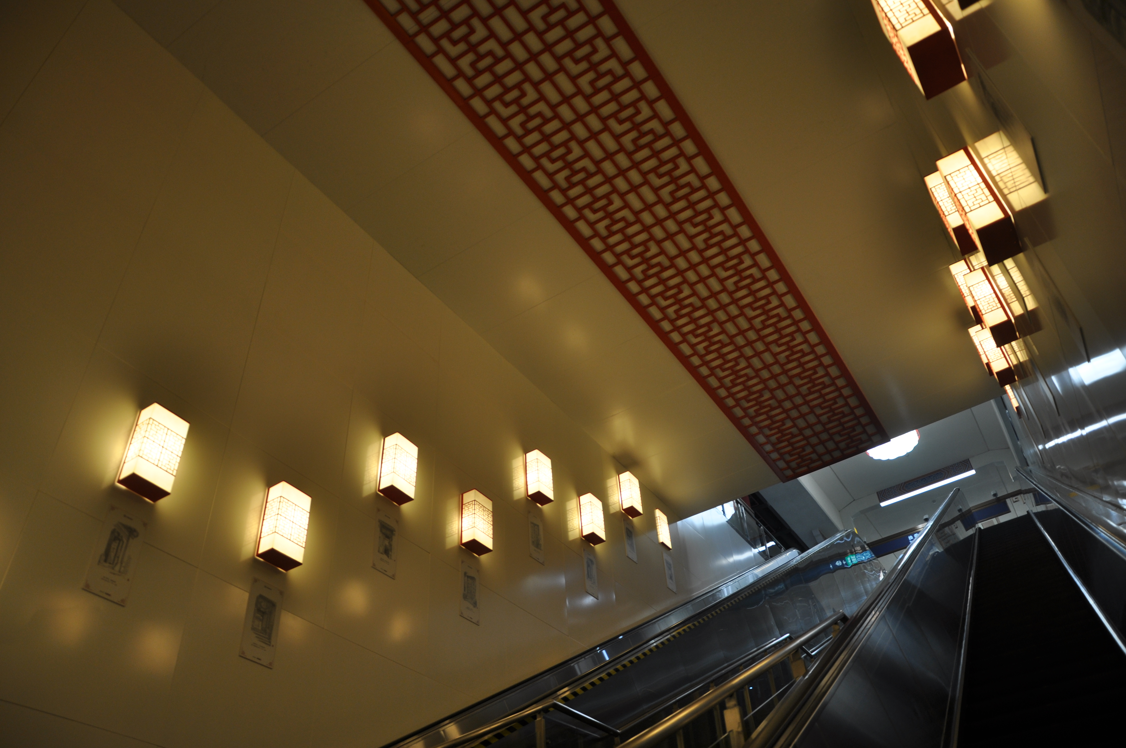 北京地铁16号线西苑站站台至站厅的楼扶梯空间的装饰